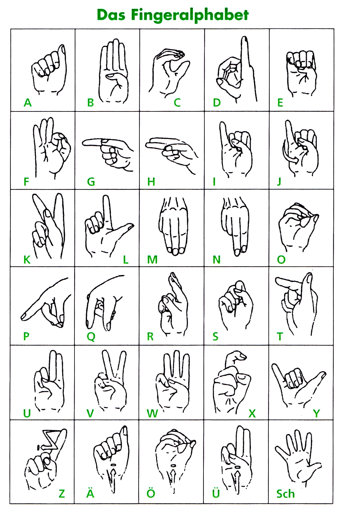 Das deutsche Gehörlosenalphabet mit Umlauten und Sonderzeichen für "SCH" zur Verfügung gestellt vom Landesverband Bayern der Gehörlosen e. V. Unterstützt von der AOK Bayern - Die Gesundheitskasse